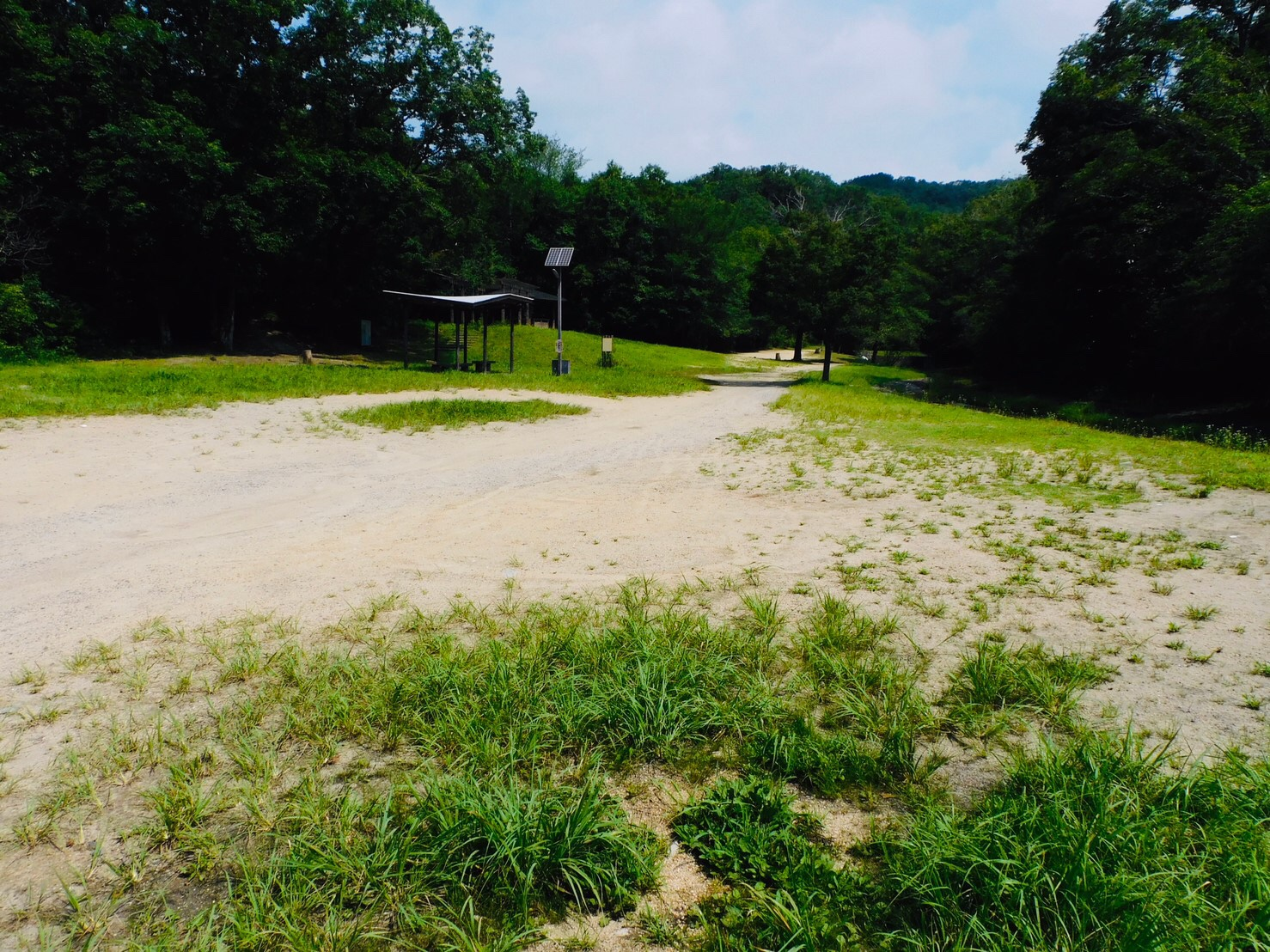 不動川砂防歴史公園にて撮影。